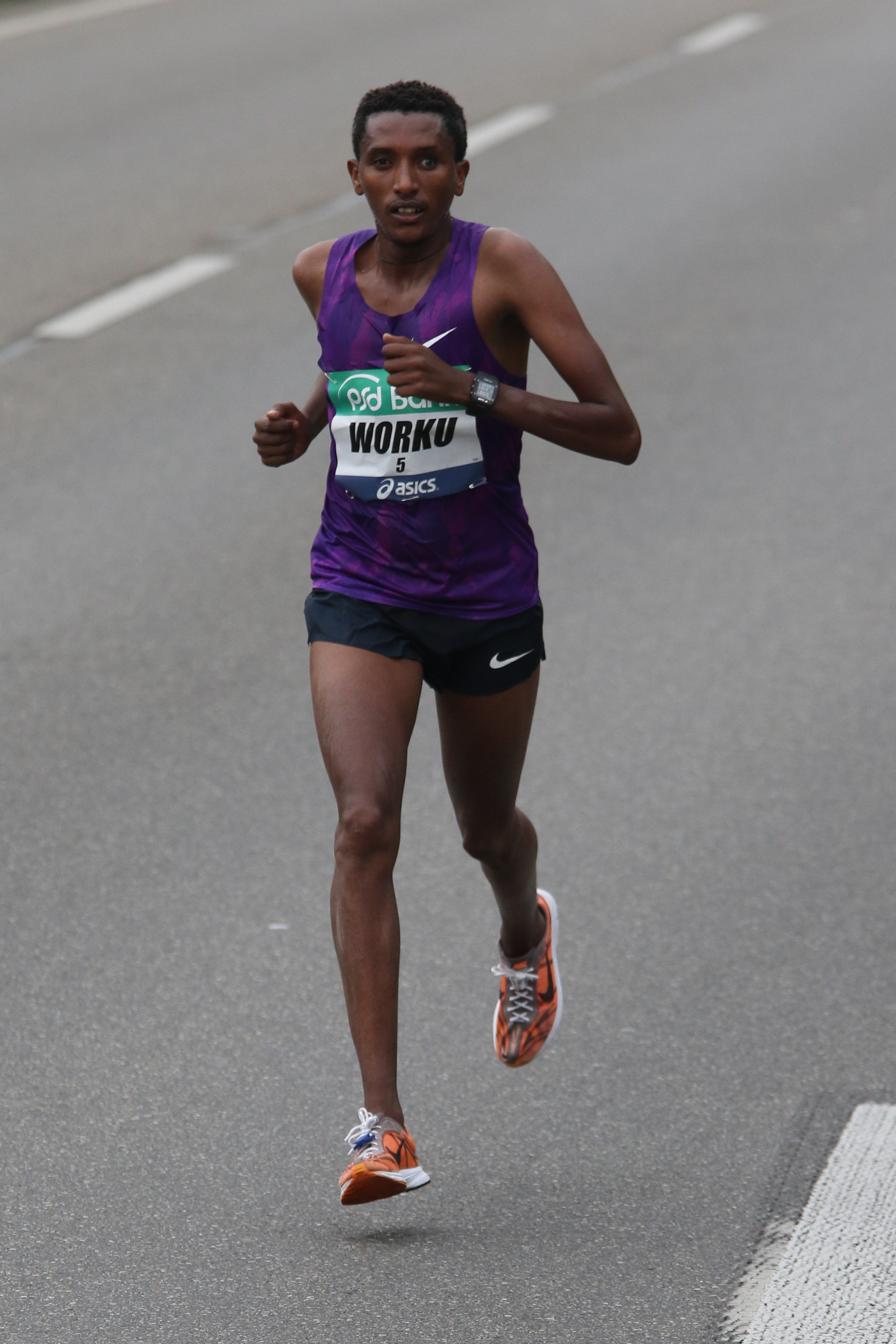 Frankfurt Marathon, 2015 Schwanheimer Brücke, Bazu Worku Hayla